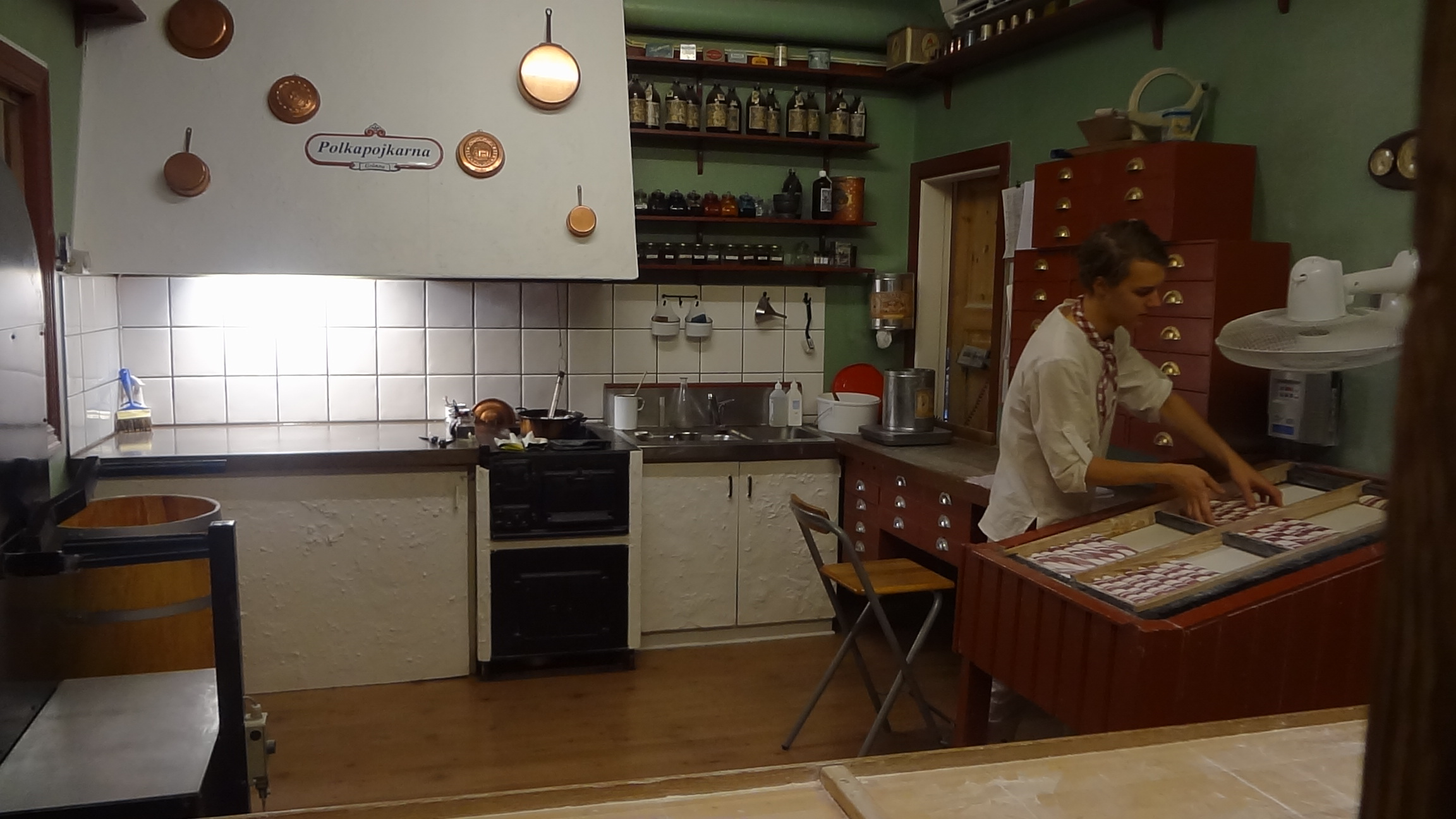 Polkagris gozokiaren fabrikazioa